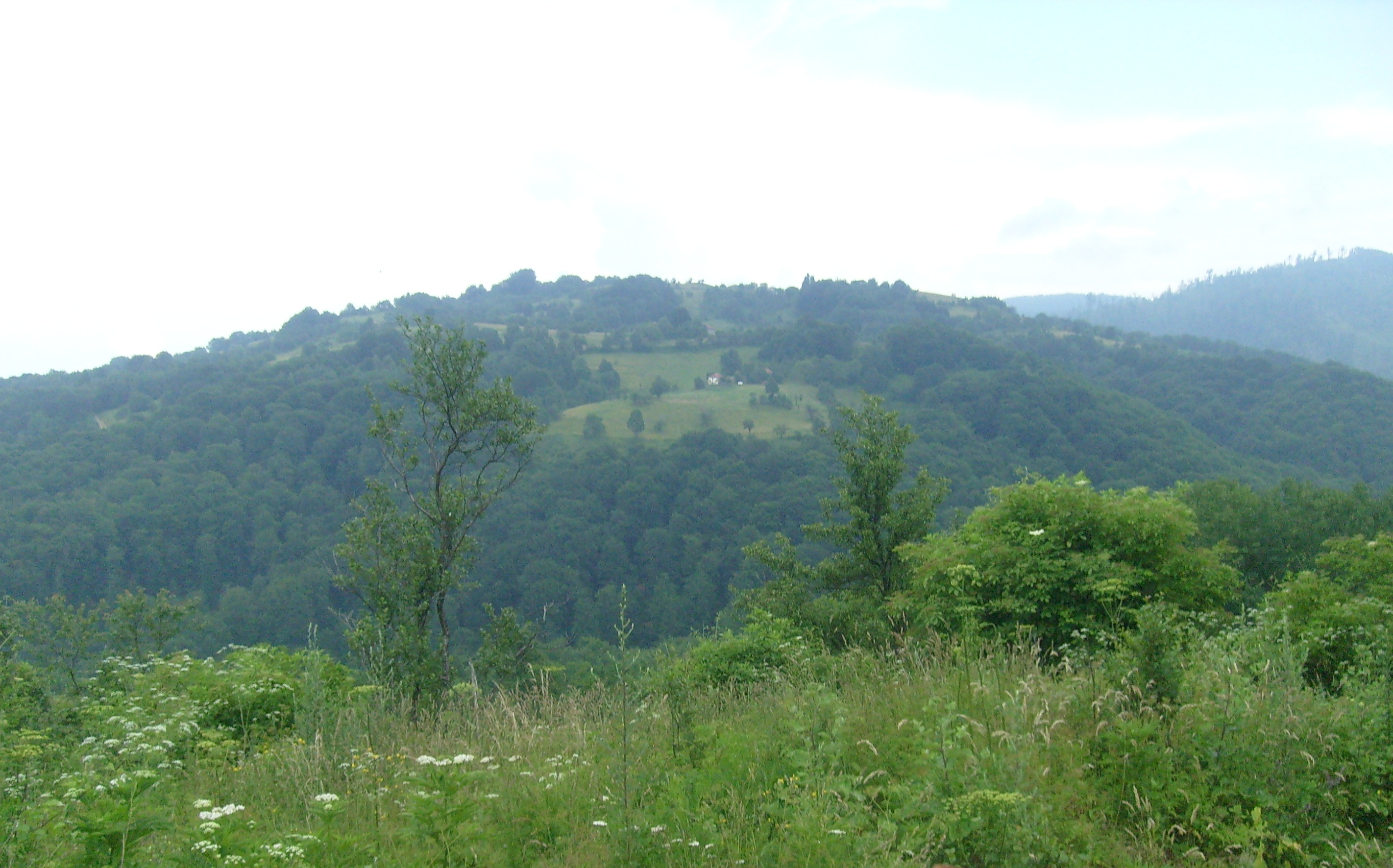 Selo Trstena Panorama